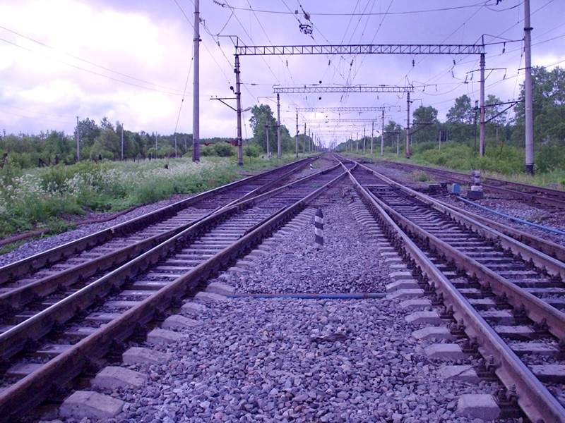 Станция Харовская на железнодорожной магистрали Вологда — Коноша (широкая колея, «РЖД») вблизи того места, где отходит ветка к Харовскому шпалопропиточному заводу. Вид на юг, в сторону станции Семигородняя. Харовск, Вологодская область.